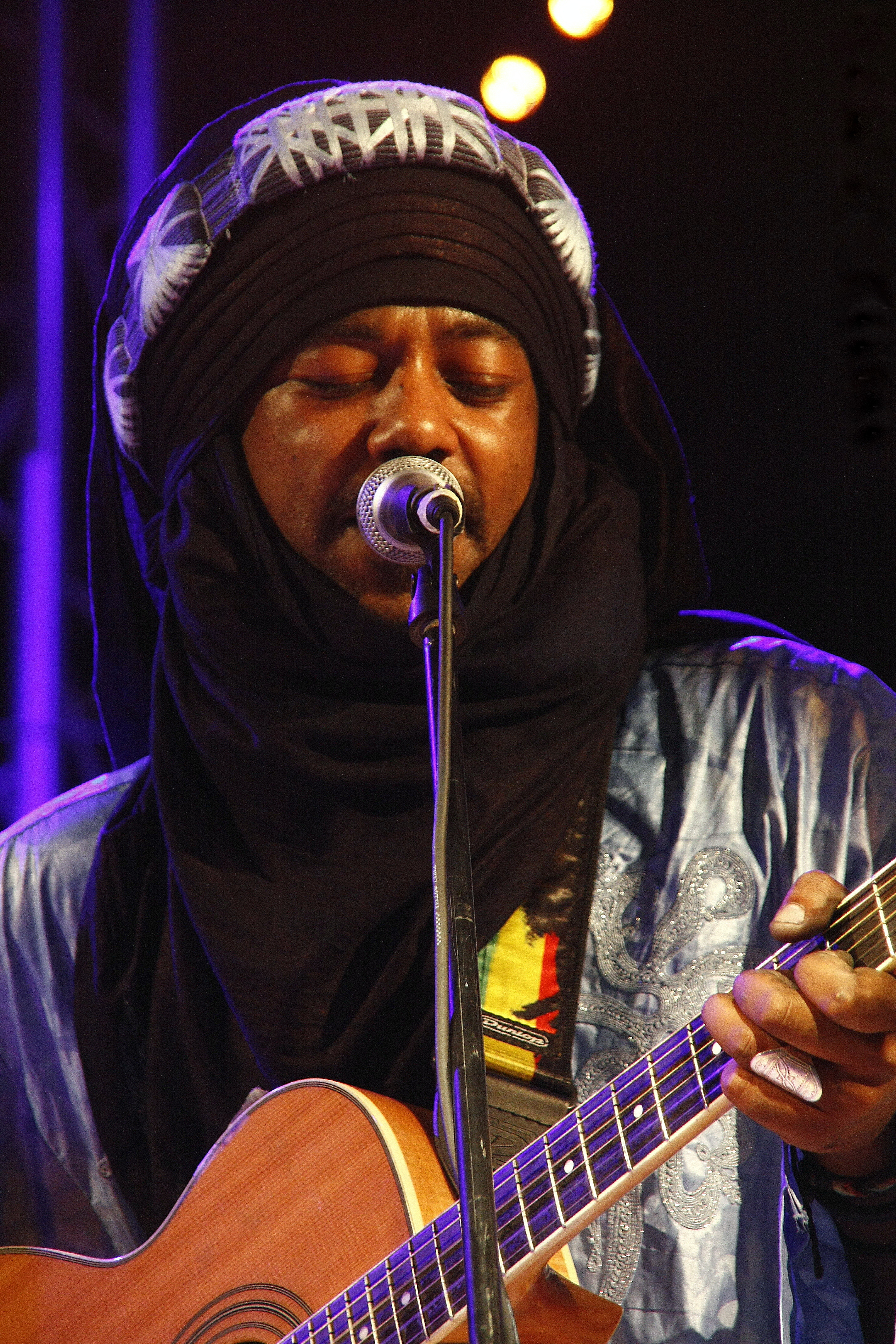 nabil bali fils du celebre othmane bali This is an image from Algeria